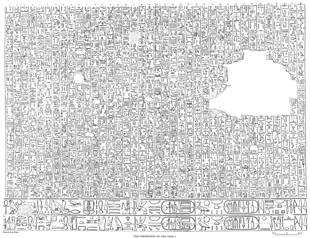 Reliefy z Medinet Habu, hieroglyfický zápis